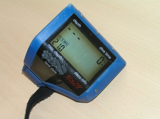 Dit materiaal is eigen werk van de auteur en in het publiek domein geplaatst. This image has been (or is hereby) released into the public domain by its creator Categorie:Wikipedia:Afbeeldingen in het publiek domein (eigen werk)